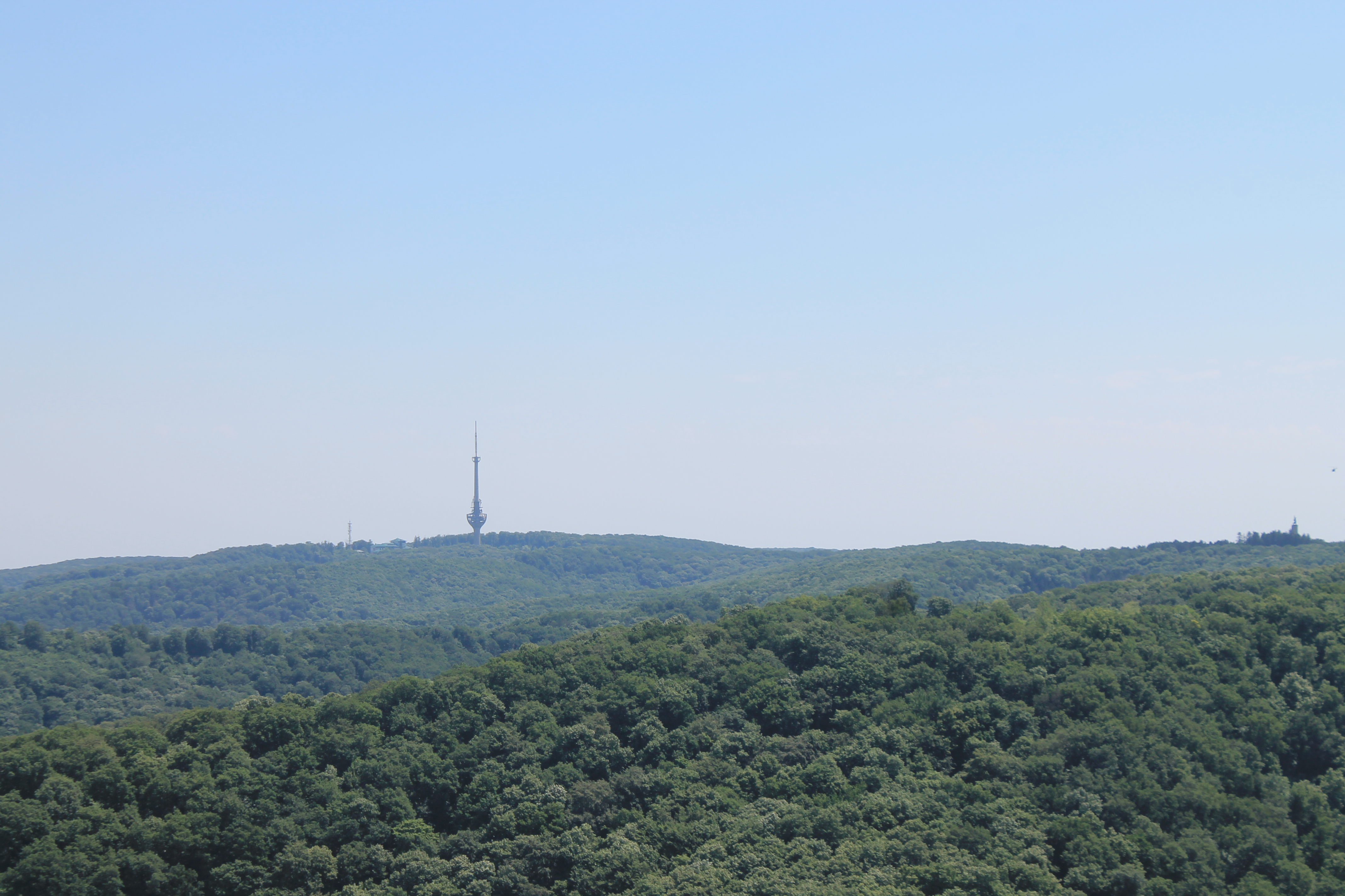 Fruška gora, panorama